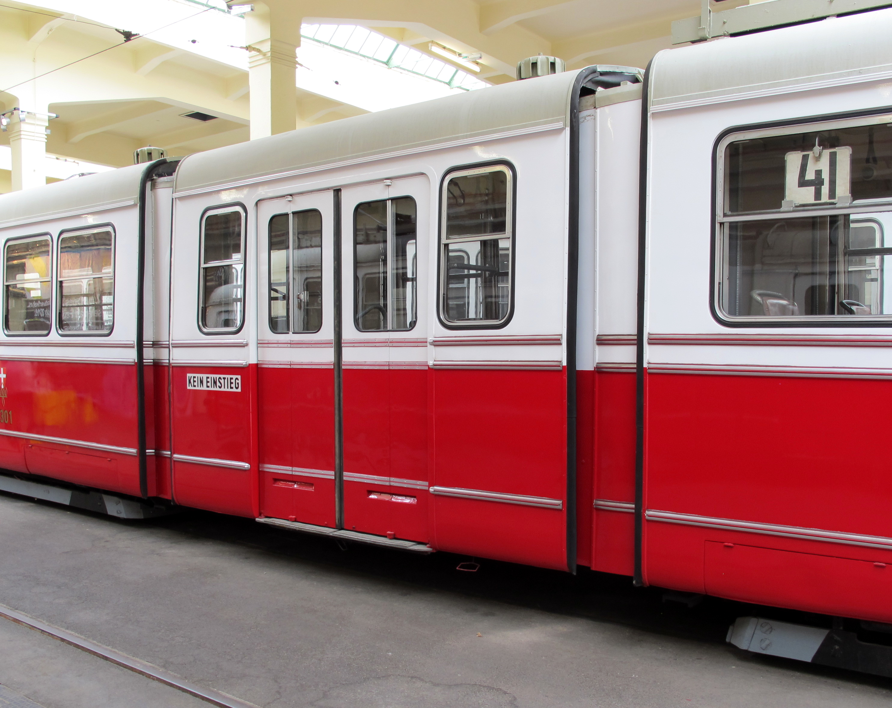 Wiener Straßenbahnmuseum Triebwagen Type D - Detailaufnahme des doppelten Drehgelenkes in Wagenmitte Triebwagen Type D Nr. 4301 Gebaut 1957 von Waggonfabrik Gräf & Stift, FbNr.7614 unter Verwendung der Untergestelle der n1-Beiwagen 5782 und 5784 gebaut 1926 von Simmeringer Waggonfabrik Länge über Puffer: 21280 mm, Achsstand: 3600/10700/3600 mm, Eigengewicht: 28875 kg